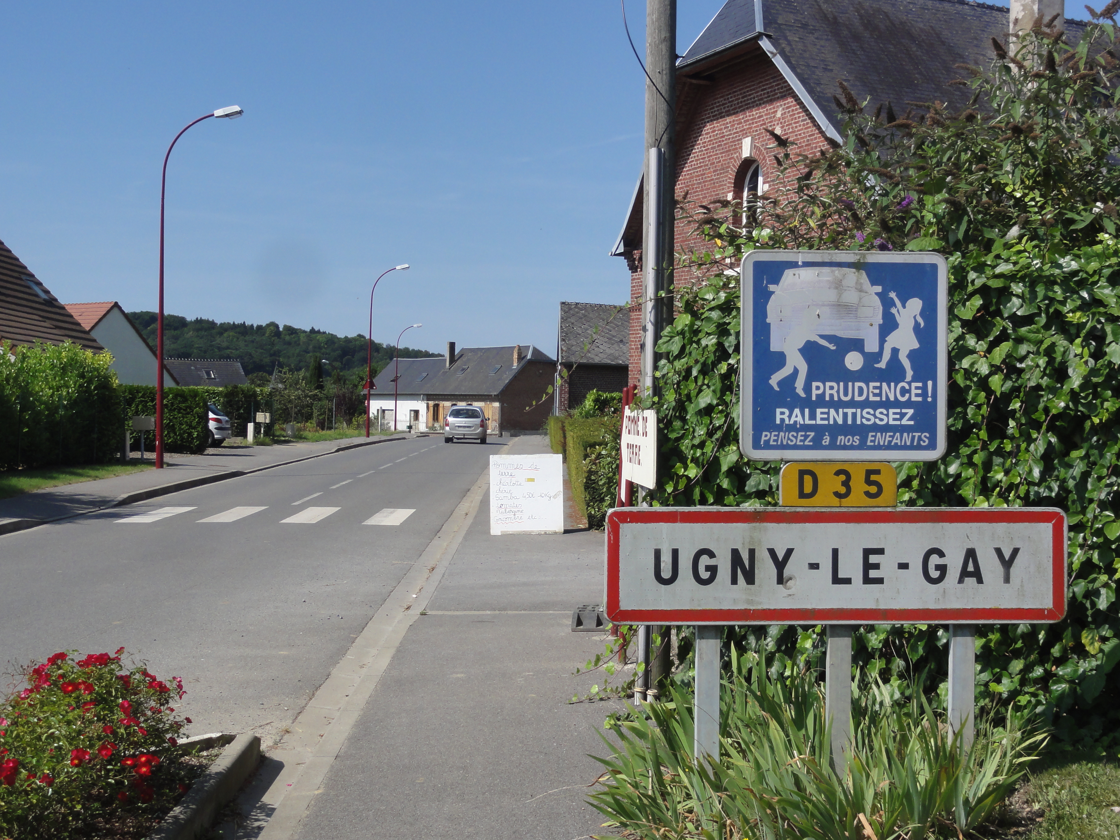 Ugny-le-Gay (Aisne) city limit sign